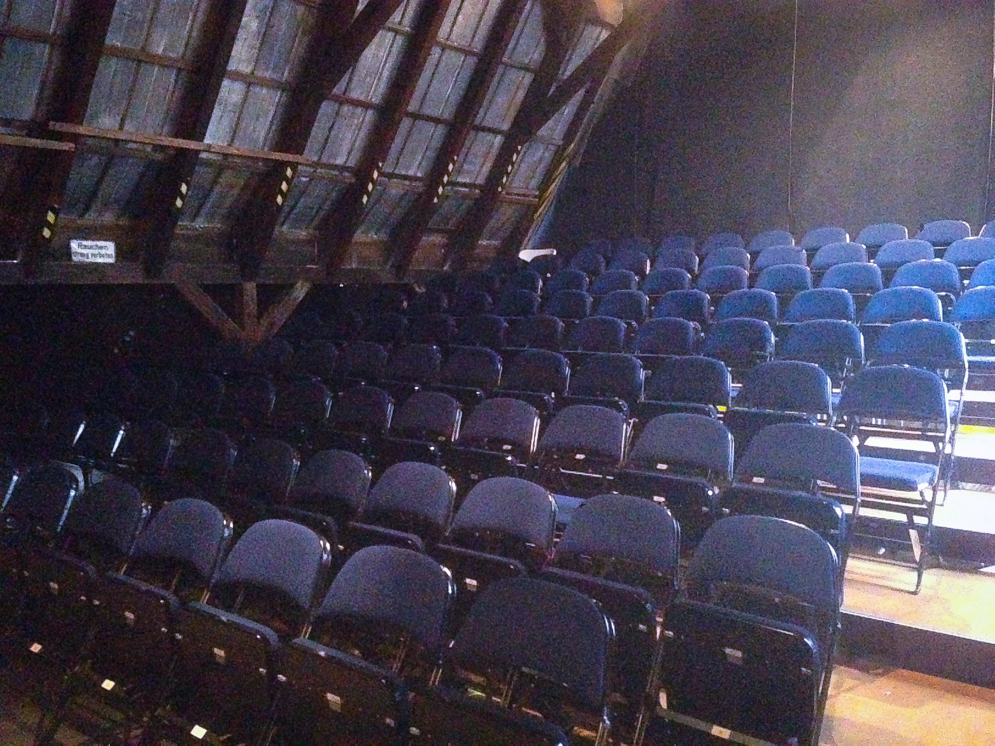 Hoftheater Steingraber Zuschauerraum